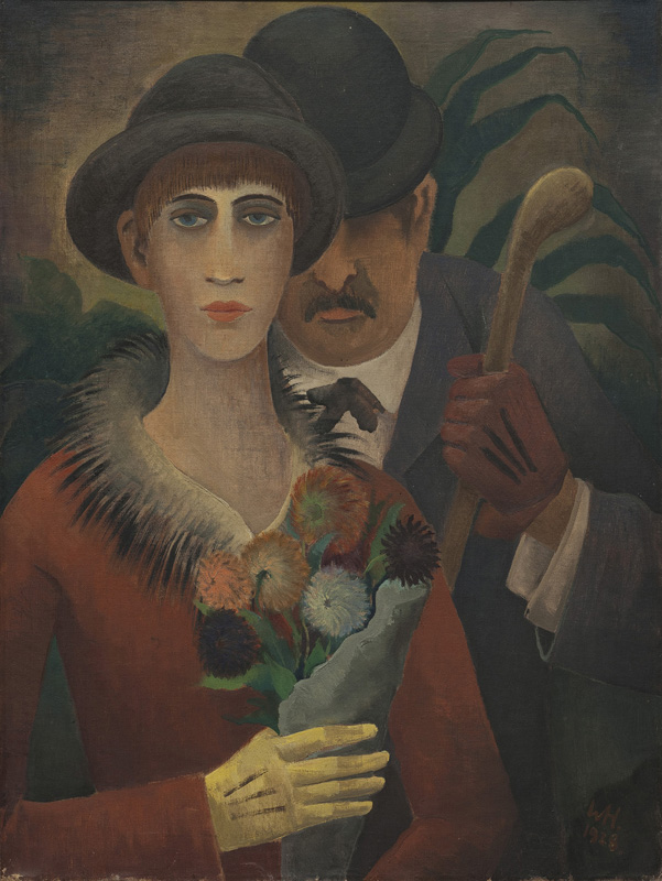 Werner Heuser (1880-1964) "In den Anlagen" (1928) Öl auf Leinwand, 60 x 80 cm